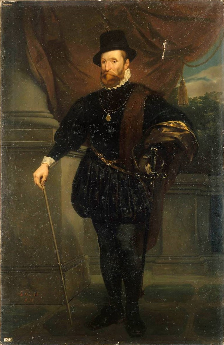 Gaspard de Saulx, seigneur de Tavannes, Marechal de France (1505-1573), portant le collier de l'ordre de Saint-Michel.